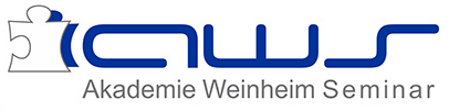 Logo der Akademie Weinheim Seminare e.V.